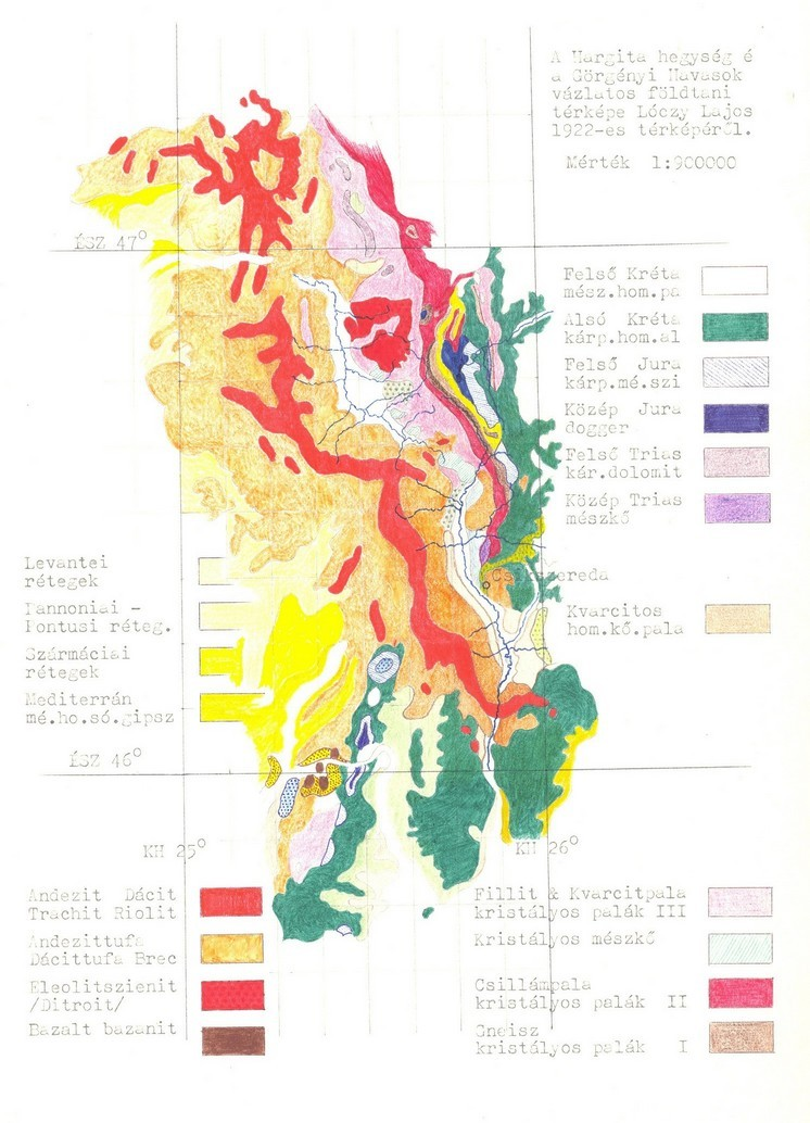 A Hargita-hegységnek és környékének geológiai térképvázlata Lóczy Lajos térképei nyomán